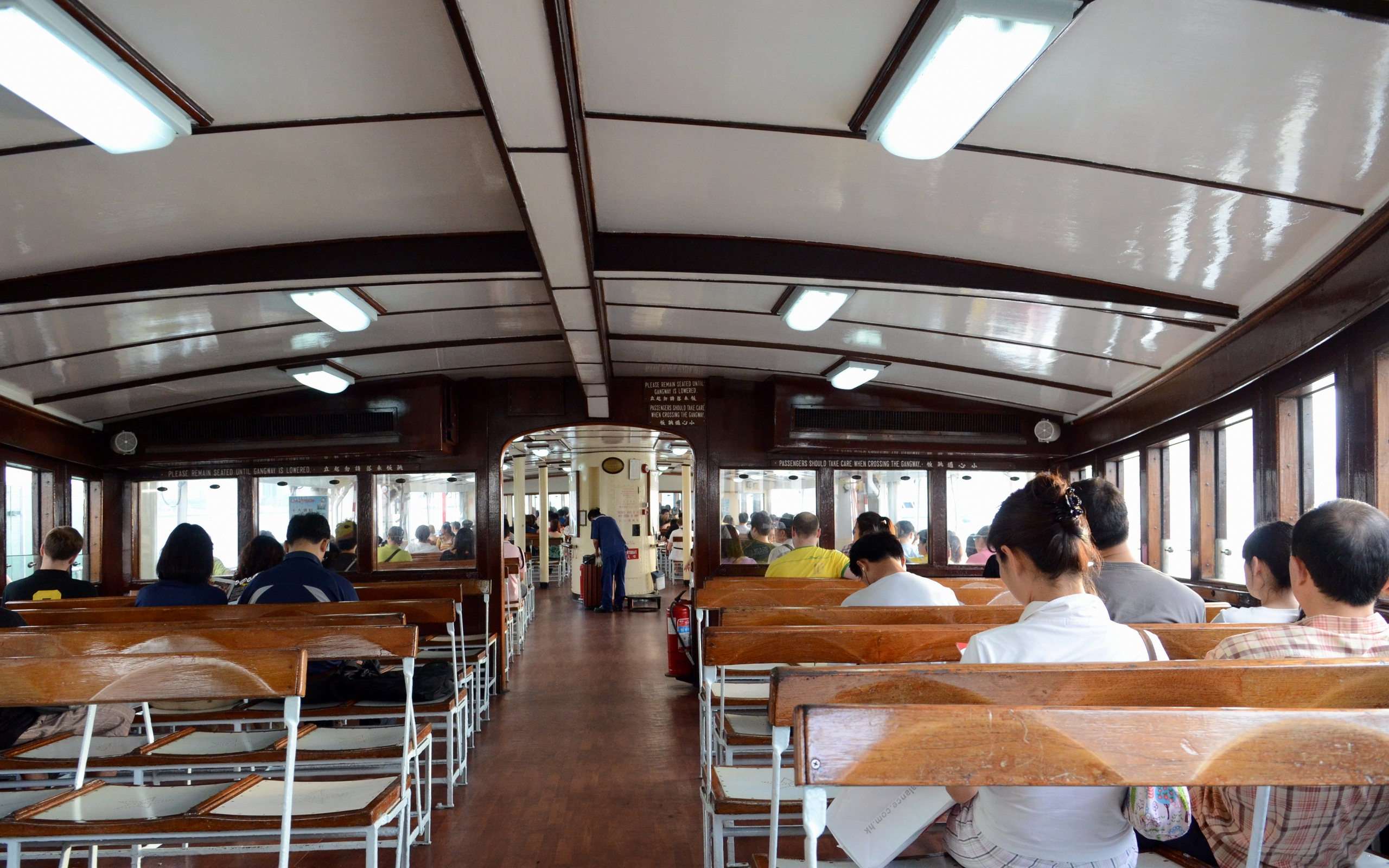 天星小轮 夜星（Night Star）上层